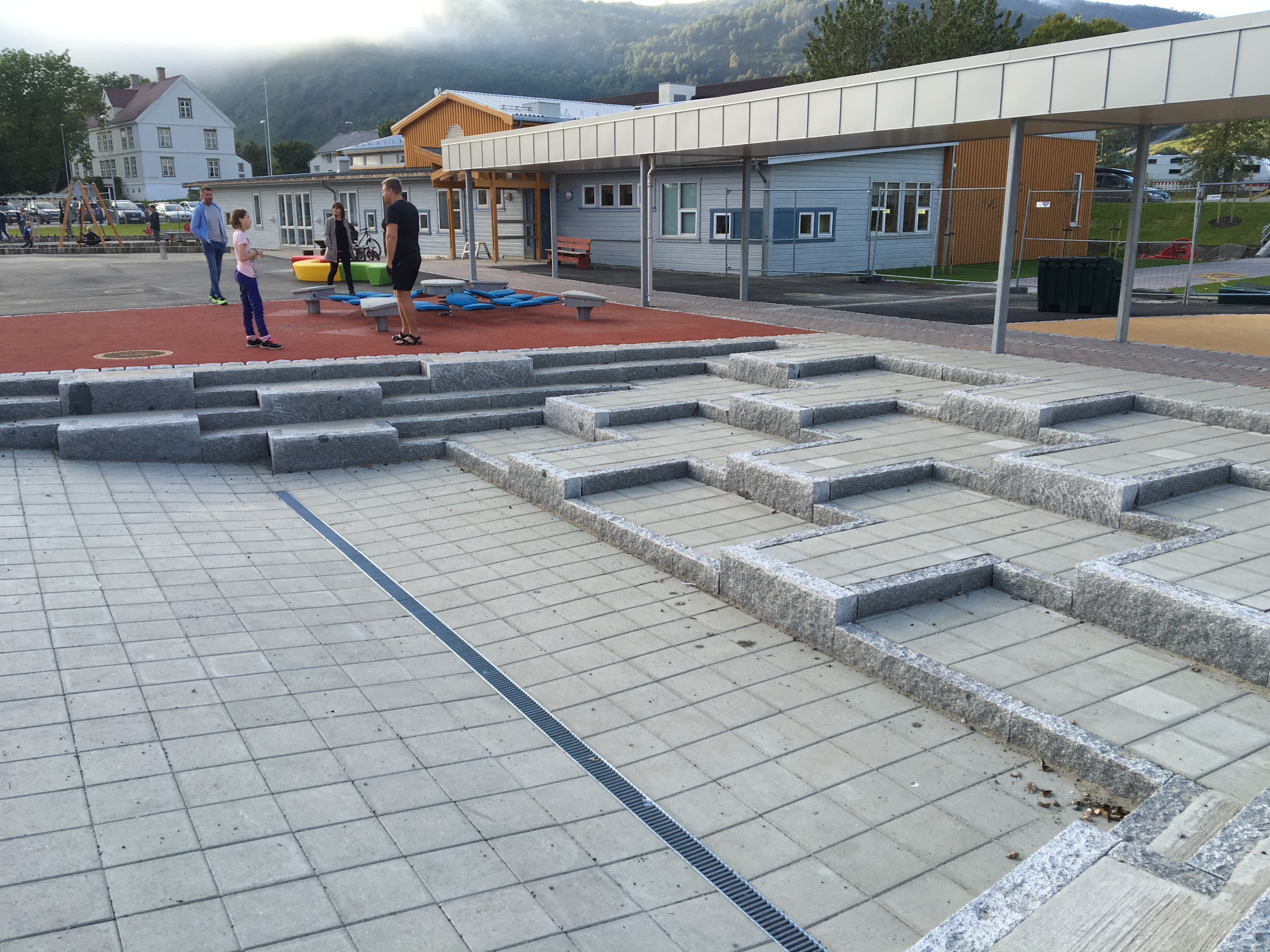 Uteområdet, Melbu skole. Foto: Thor-Ivar Guldberg